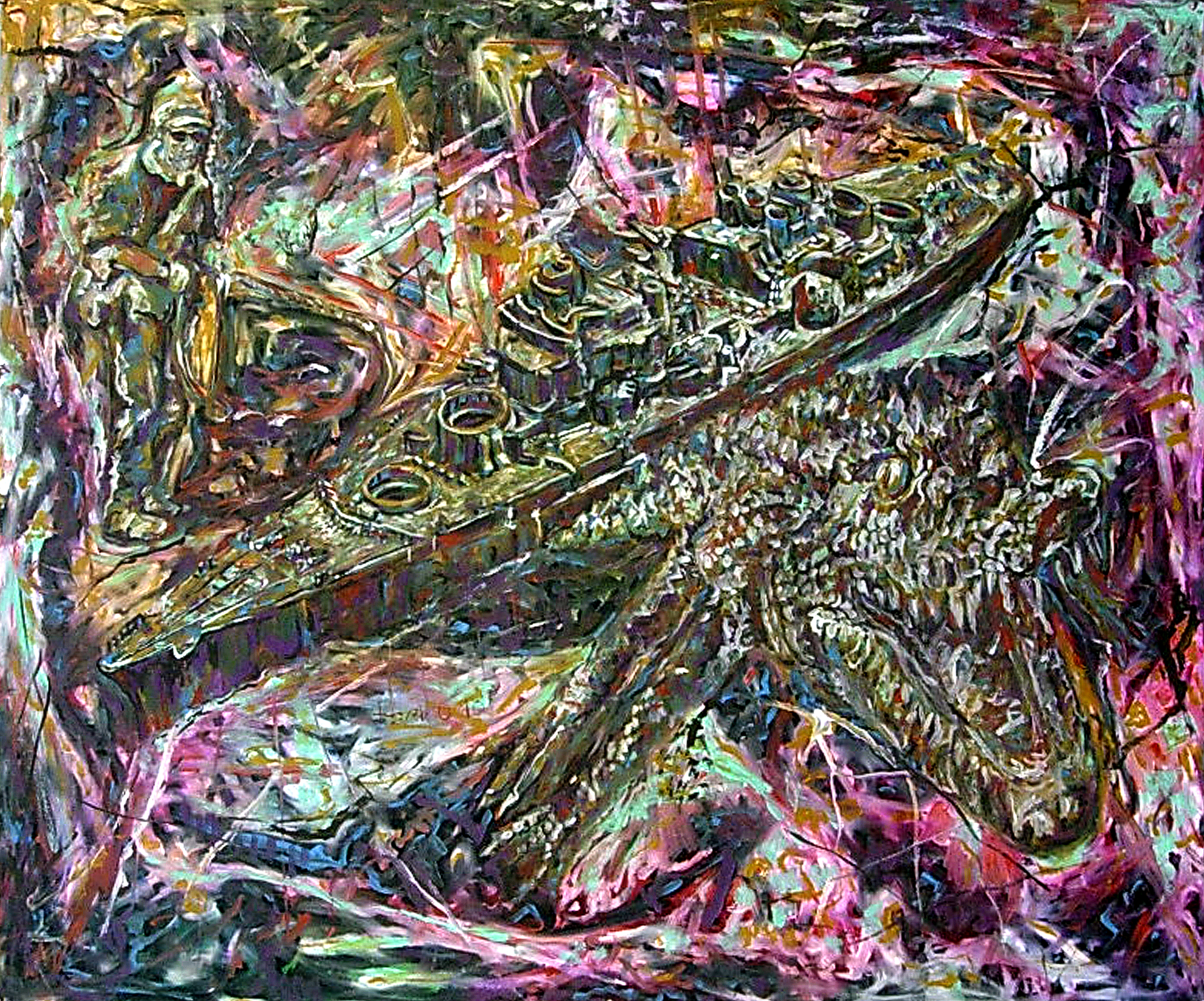 Öl auf Aluminium, 103,5 x 127 cm